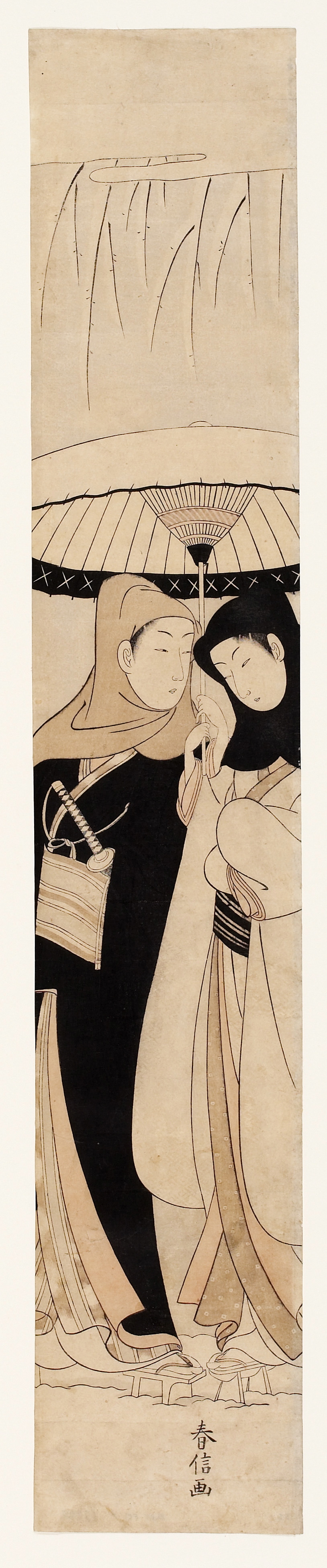 Liebespaar unter einem Schirm. 70.5 x 12.7 cm. Geschenk James A. Michener, 1991. Honolulu Museum of Art (20031)